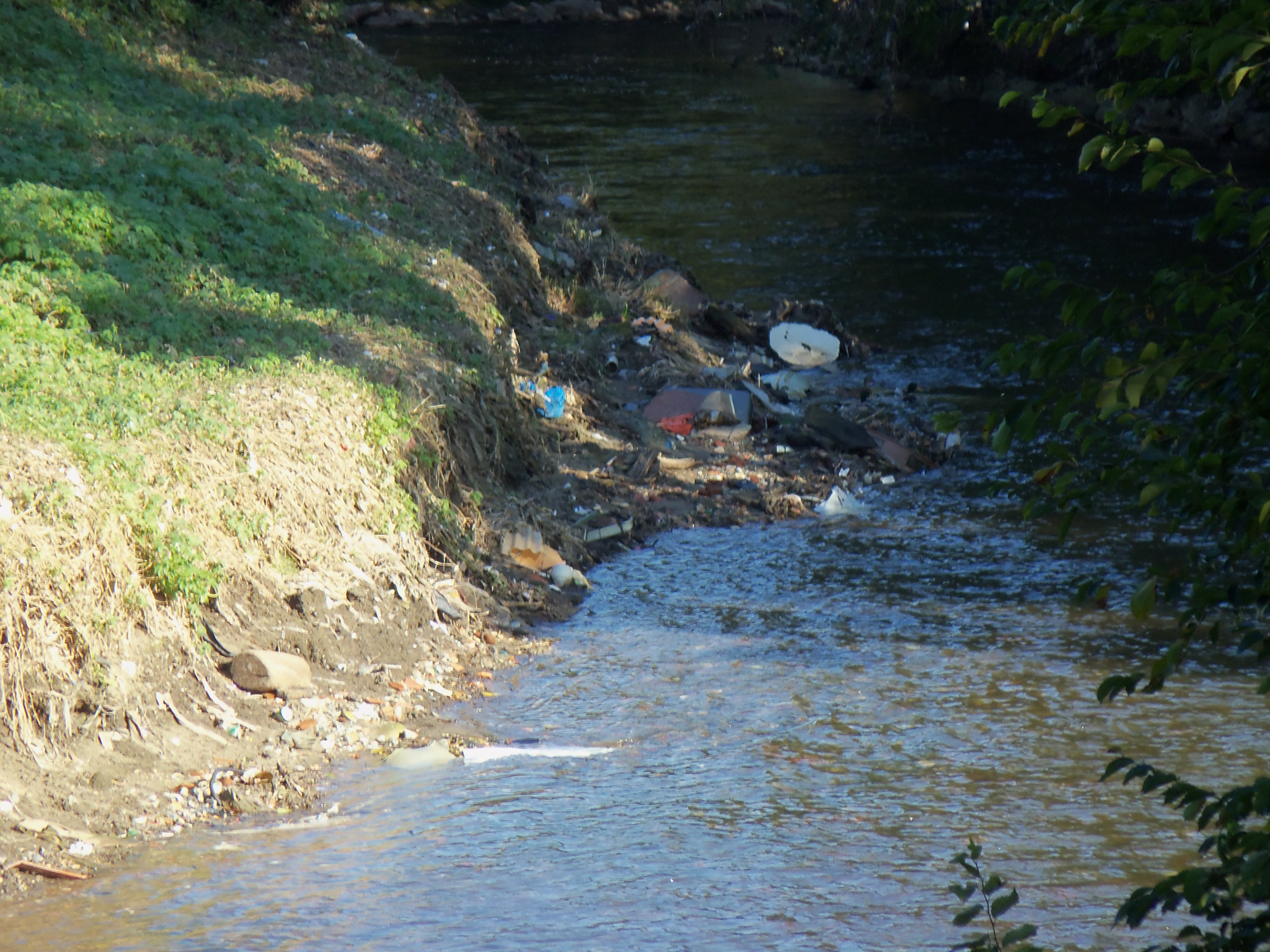 Milano:una discarica abusiva sul Lambro subito a valle di Monluè